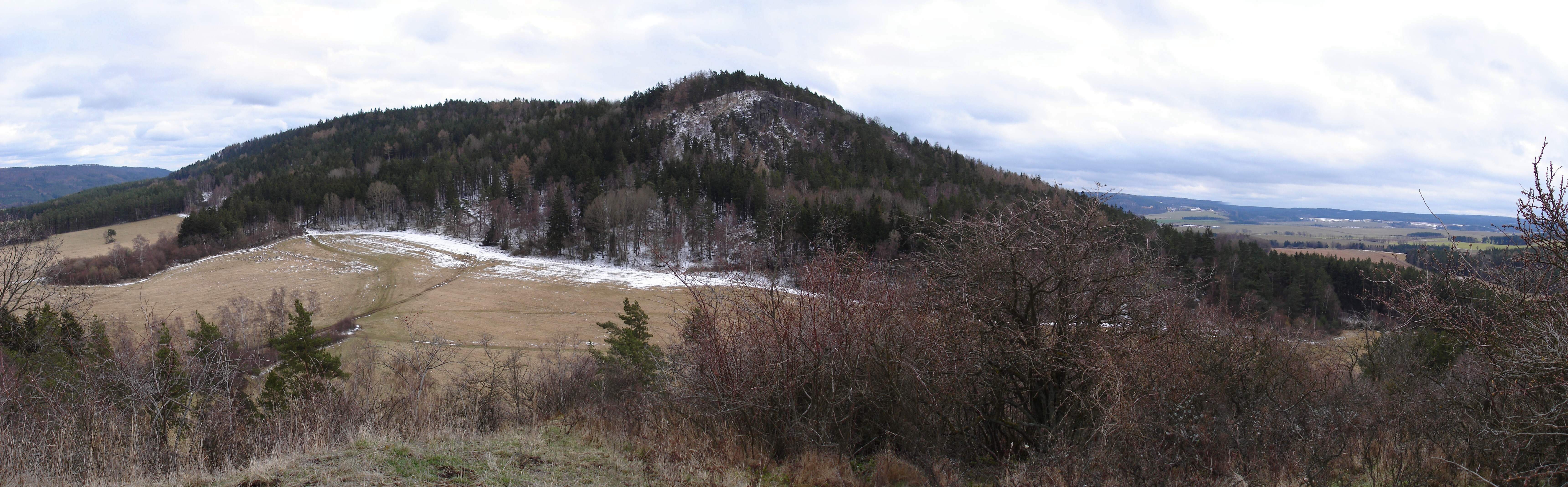 Stolová hora